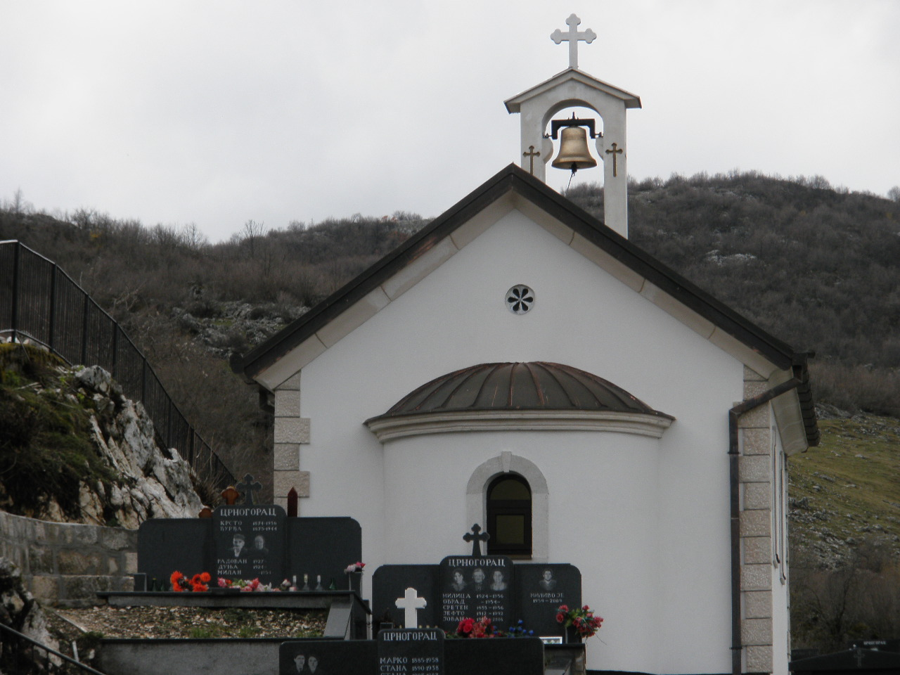 Crkva Rodjenje Presvete Bogorodice u Starim Dulicima